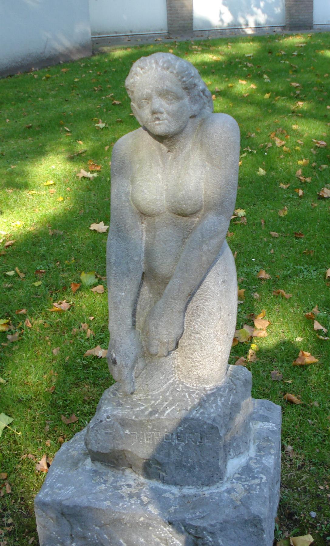 Baarn, Stationsweg, gemeentehuis. Kunstwerk "Vrouw" van Jan Broerze. Baarn/The Netherlands. FOP.